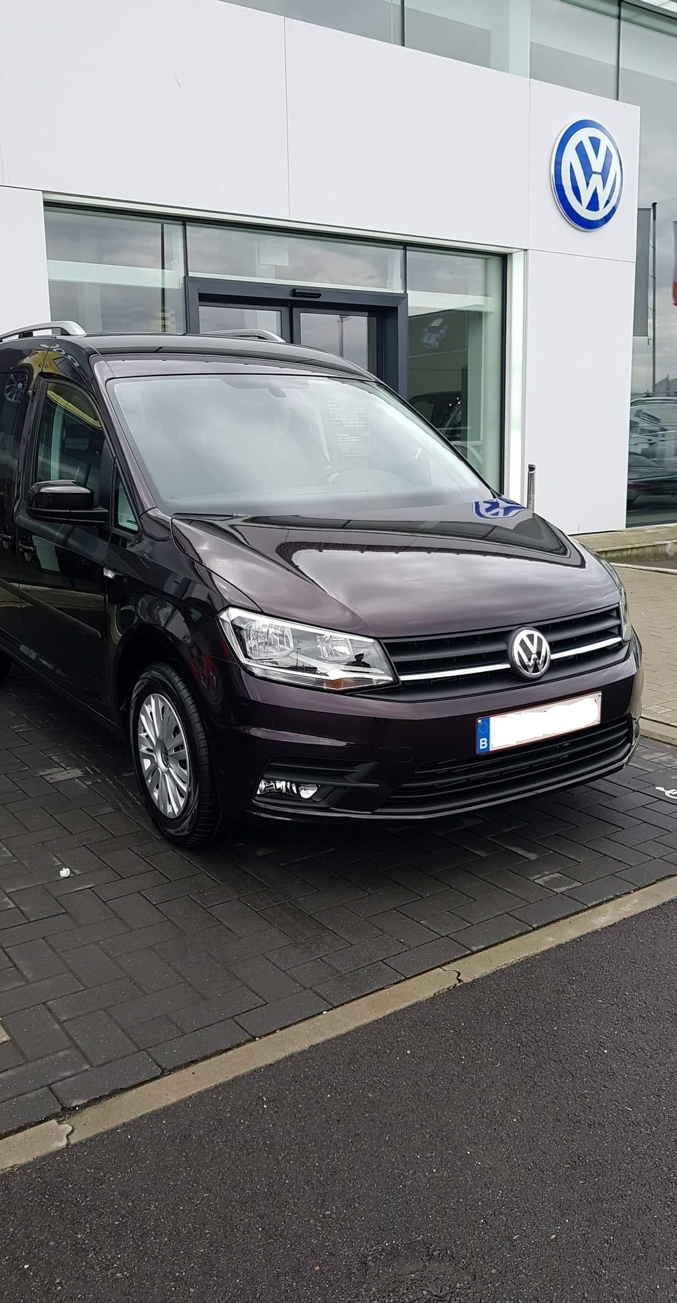 Bij aanschaf van een nieuwe Volkswagen Caddy. De foto is genomen in 2018 in Zaventem.